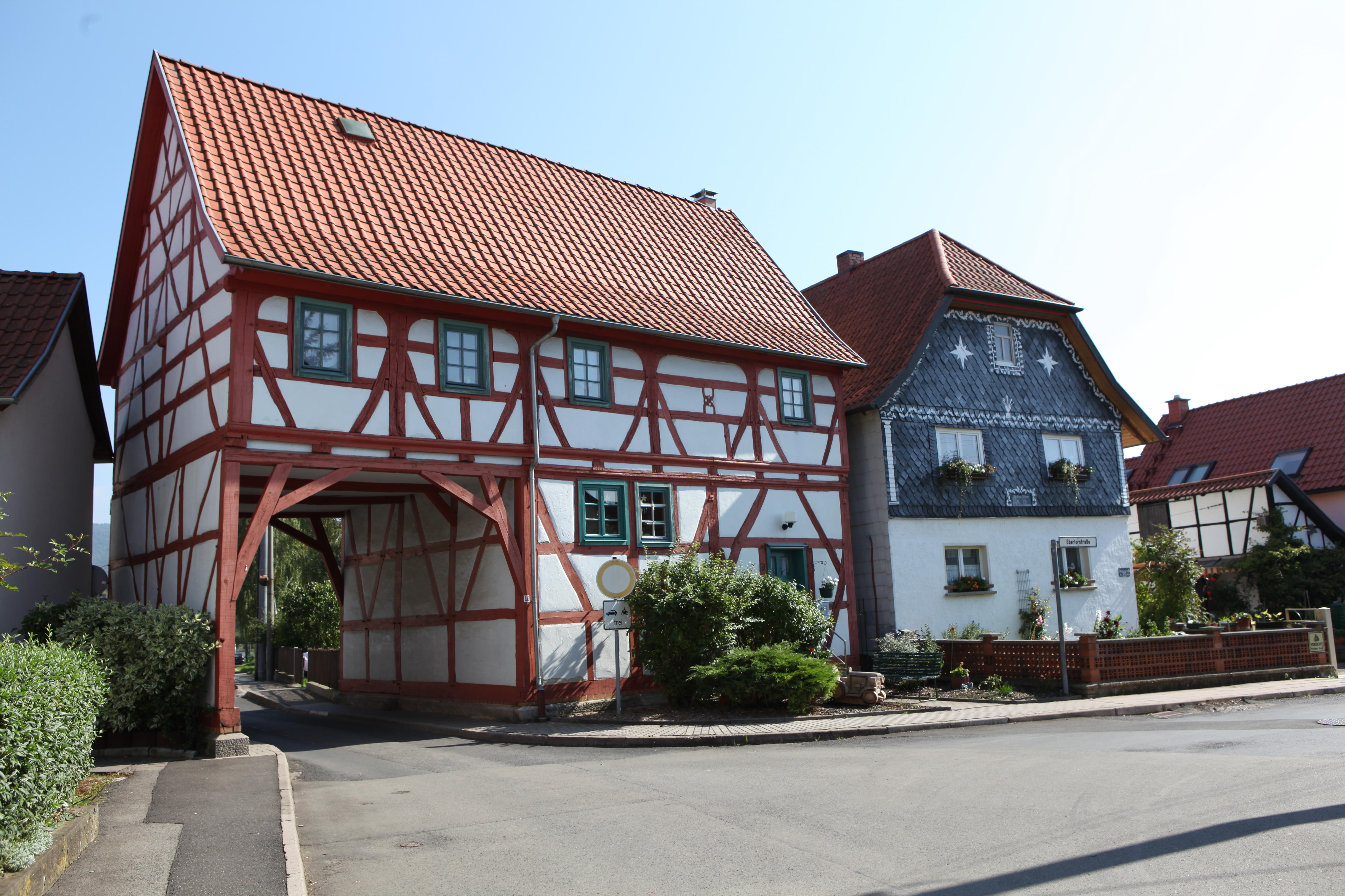 Torhaus in Milz, Landkreis Hildburghausen